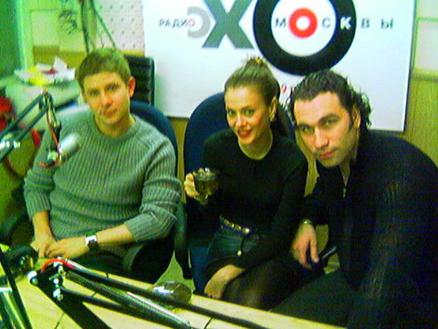 Hi-Fi